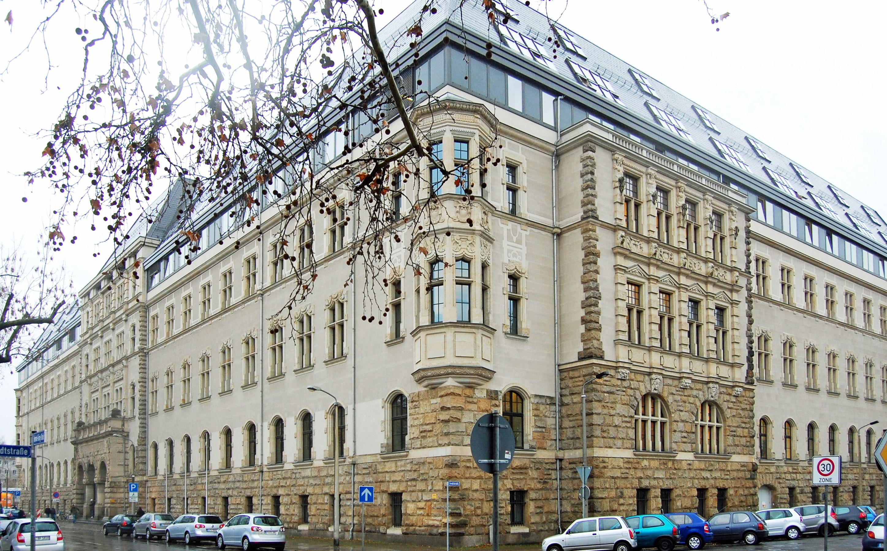 Amtsgericht Leipzig, ursprünglich als königlich-sächsisches Landgericht erbaut.